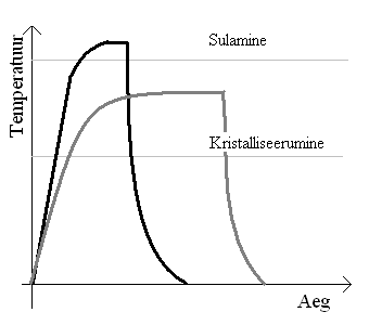 Faasimuutmaterjali faasi muutmine temperatuuriga